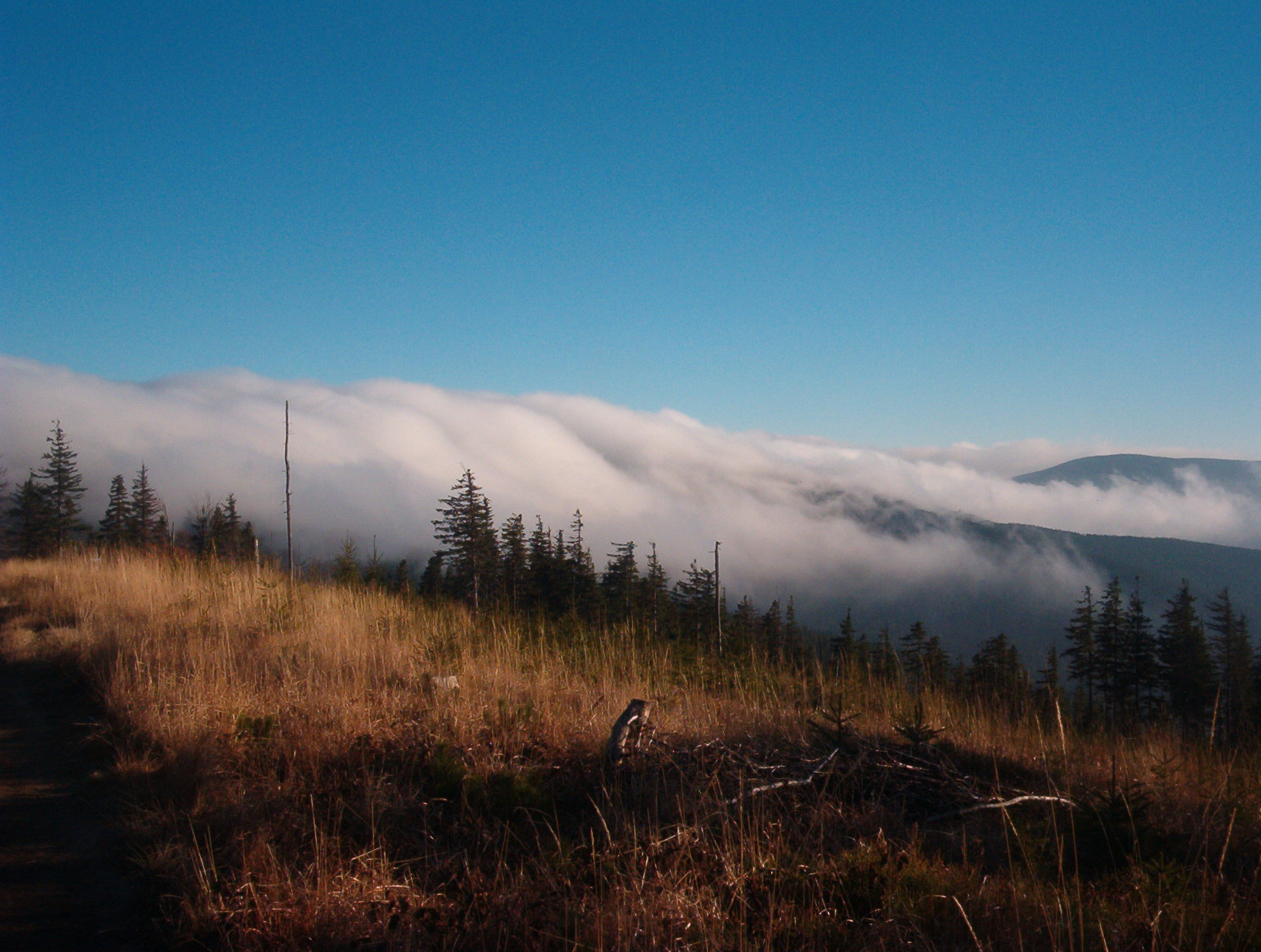 Silesian Beskids in November Beskid Śląski w listopadzie (okolice Malinowskiej Skały)